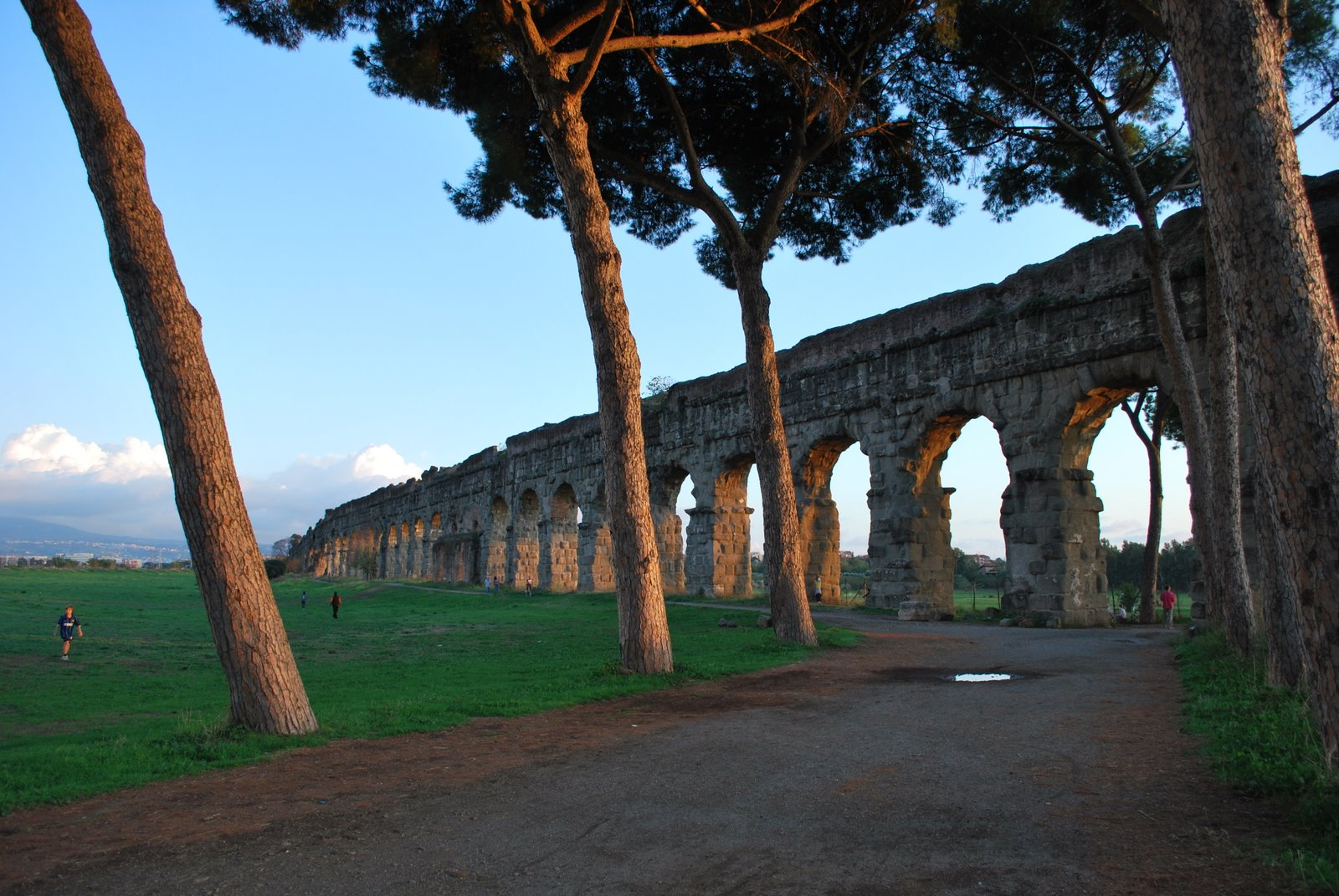 Parco degli acquedotti - Parco dell'Appia Antica - Roma